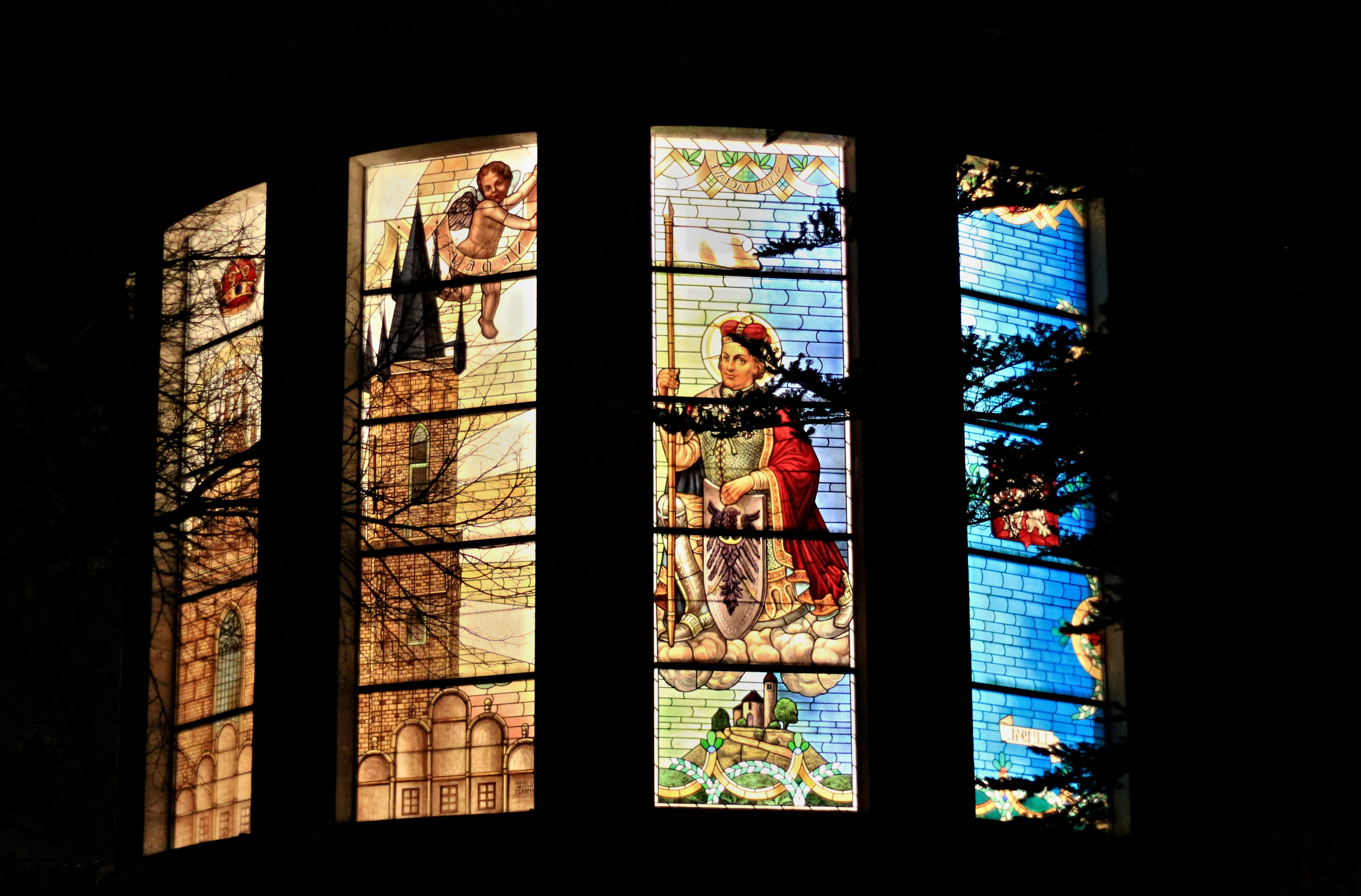 Kostel Panny Marie Královny míru, Praha 4-Lhotka